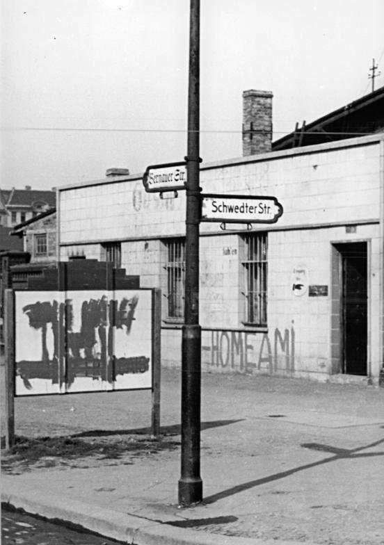 ADN-Bildarchiv 24.8.1950 "Go home, Ami" - Diese Inschrift malten Westberliner Friedensfreunde an Häuserwände an der Sektorengrenze Bernauer und Schwedter Straße in Berlin. Das Schild "Sie betreten jetzt den französischen Sektor" (links) wurde übermalt. Aufnahme: Kümpfel